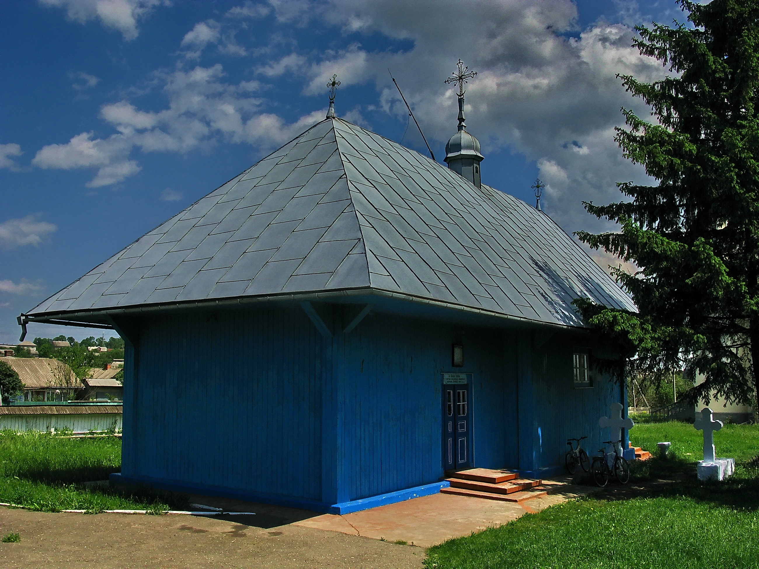 Успенська церква (дер.), Веренчанка